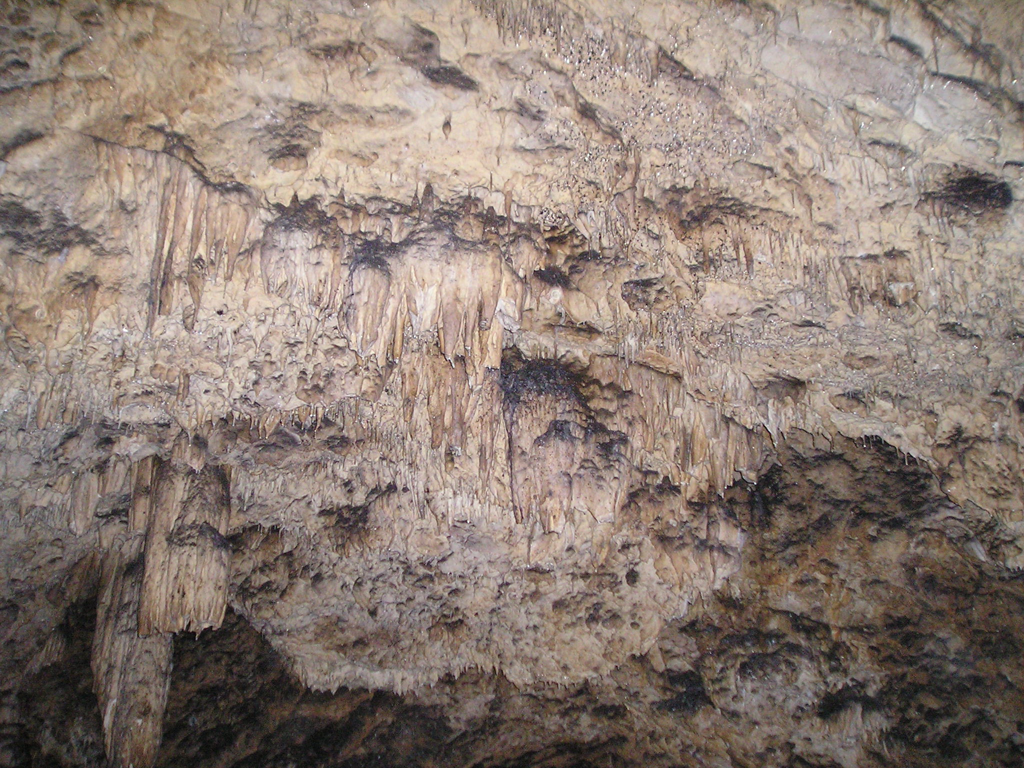 Sala Mare - Pestera Fundata